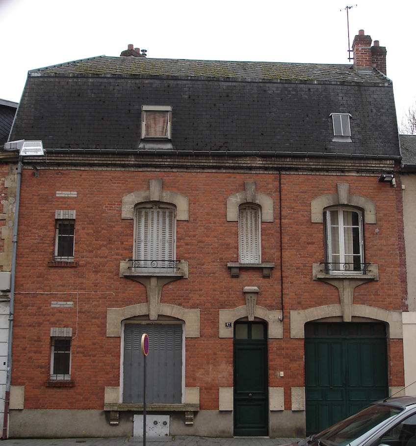 Demeure particulière, 17 rue Saint-Martin, Chauny, où, Louis Rey, architecte, a habité en 1932.